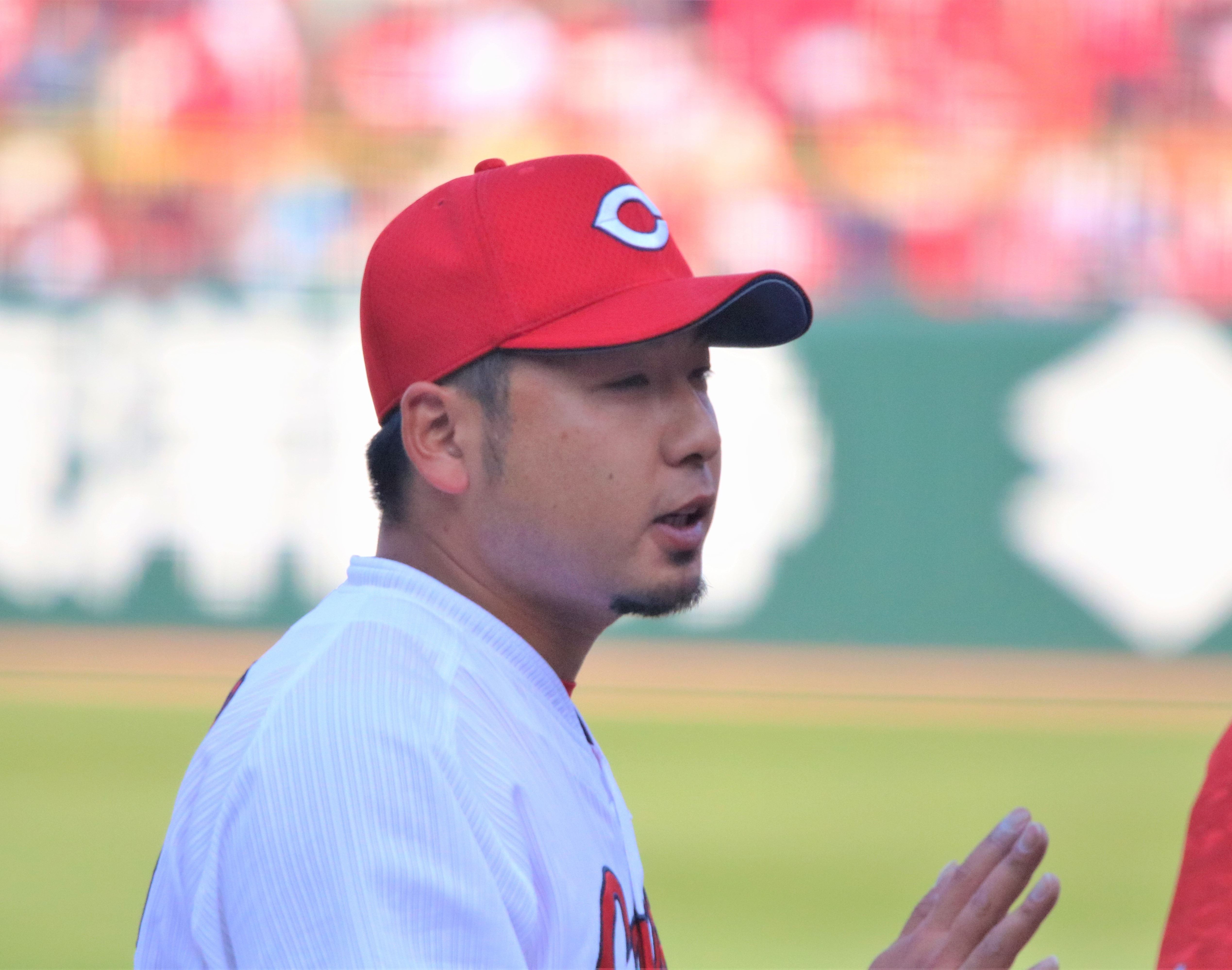 2018年3月13日マツダスタジアム